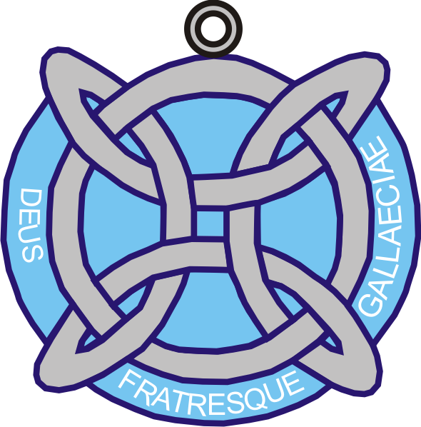 Medalla Castelao